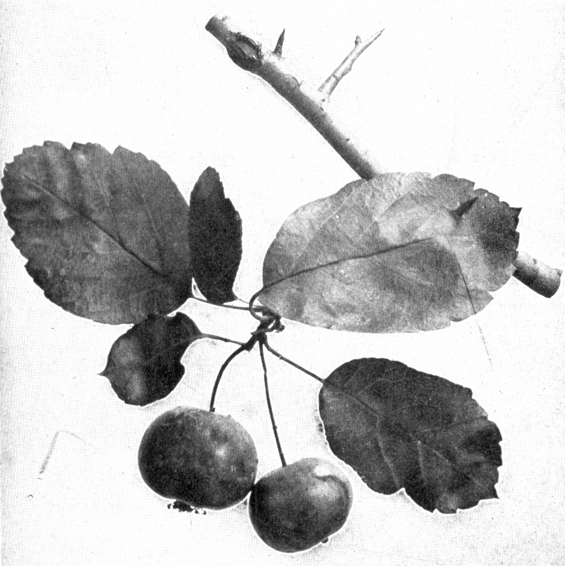 Sweet Crabapple fruiting spray